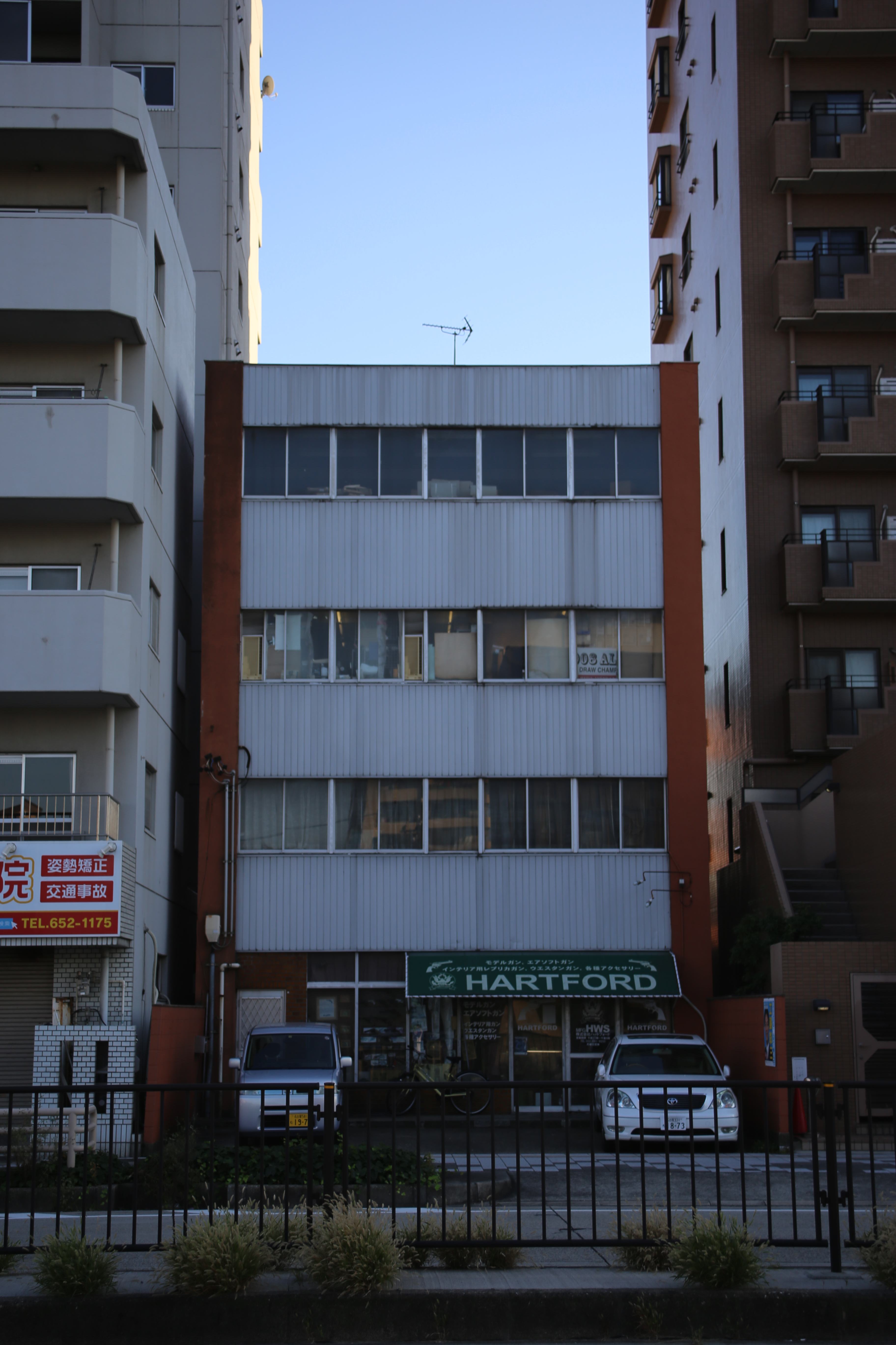 名古屋市熱田区二番に所在する日の出ビルを北側公道東側より撮影